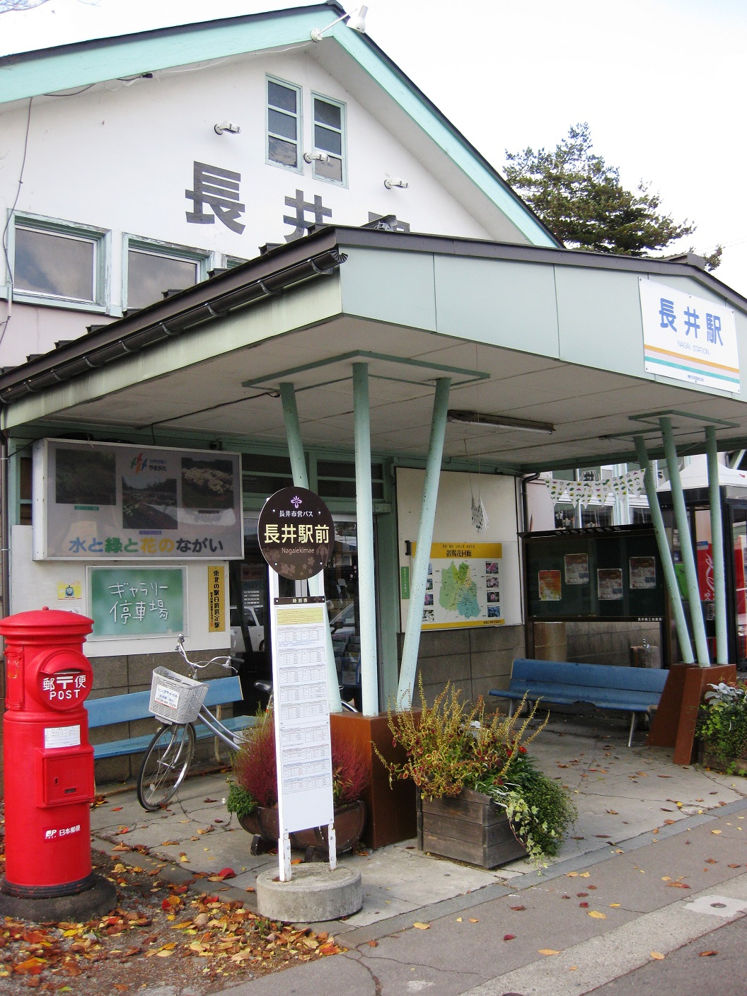 市内循環区間の長井駅前バス停